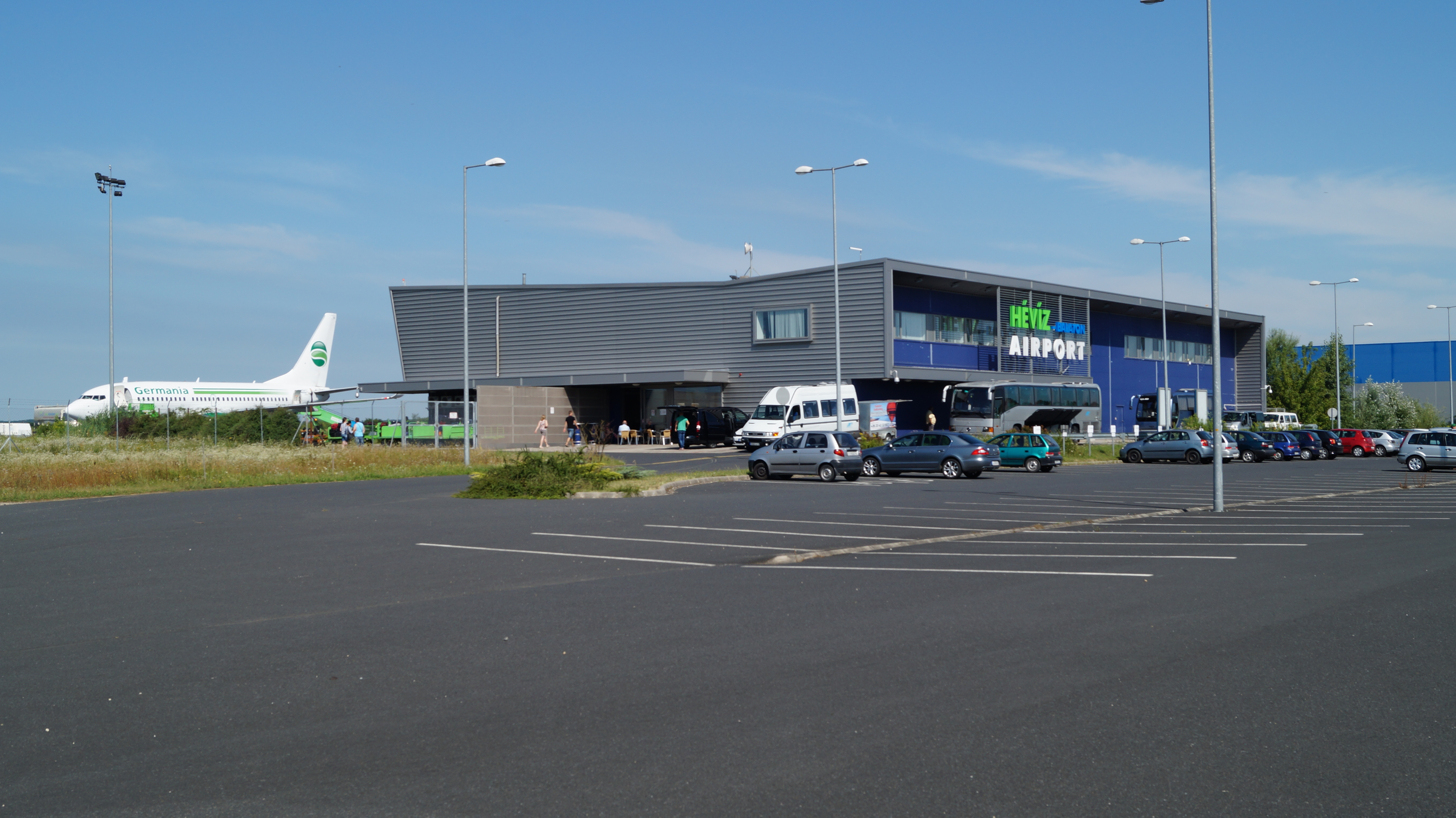 Das Flughafenterminal am Flughafen Sármellék mit einer Boeing 737-700 (D-AGEU) der Germania.